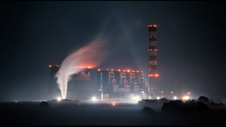 Elektrownia Opole